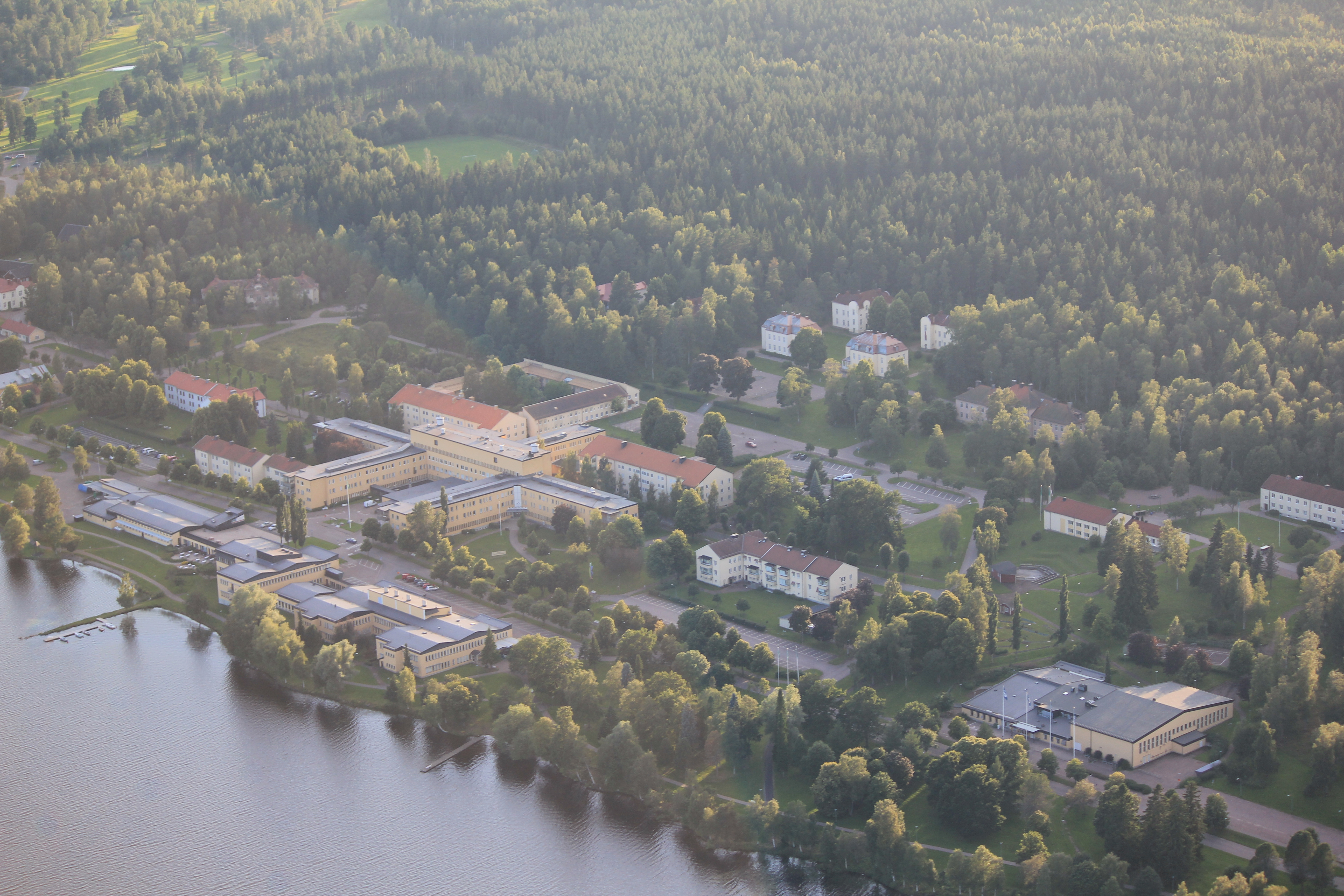 Flygfoto över Skönvik, Säters kommun, Dalarnas län, Sverige This aerial photograph has been approved for publishing by the Swedish Armed Forces with the ID: FMTM 10 830:11043 This tag does not indicate the copyright status of the attached work. A normal copyright tag is still required. See Commons:Licensing for more information.